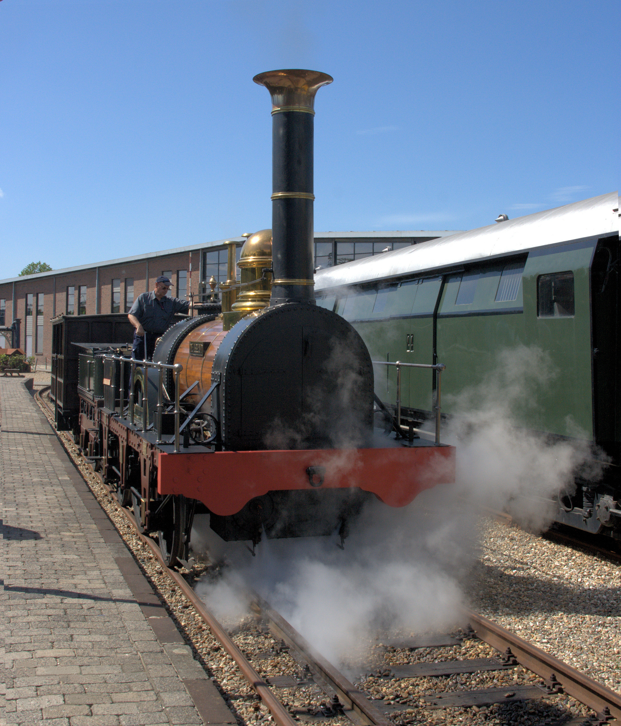 Replica van De Arend uit 1839 onder stoom